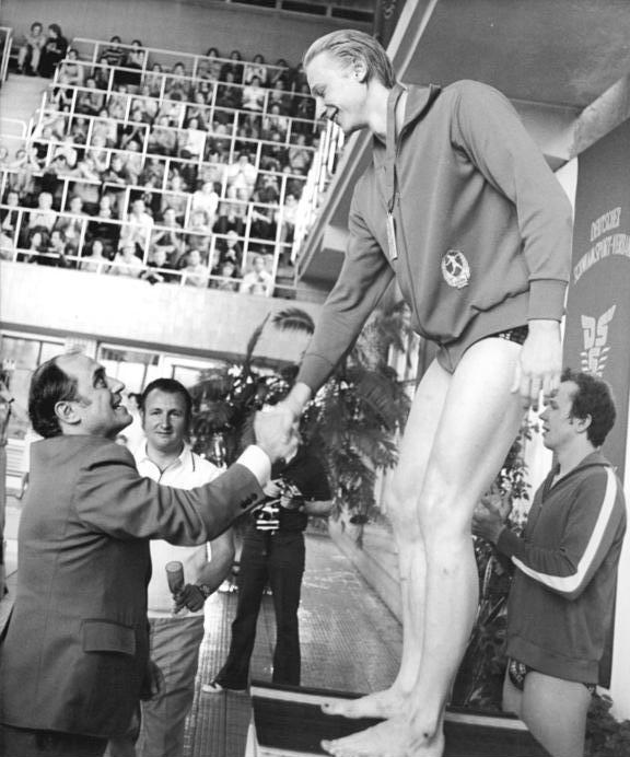 Roger Pyttel ADN-ZB Mittelstädt 3-6-76 Berlin: 27. Meisterschaften der DDR im Sportschwimmen (3.Tag)-Mit dem neuen Weltrekord von 1:59,63min siegte im Entscheidungslauf über 200 m Schmetterling der Leipziger DHfK-Sportler Roger Pyttel. Der Präsident des DSSV der DDR, Prof. Dr. Georg Zorowka, gratuliert dem erfolgreichen Titelverteidiger. Im Hintergrund rechts der Zweitplatzierte Hartmut Flöckner (TSC Berlin-2:03,25).